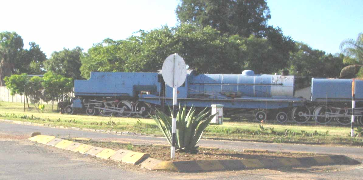 Kadoma, Конзервирана парна локомотива испред хотела Кадома, снимљено 22. марта 2005, аутор Радован Корда